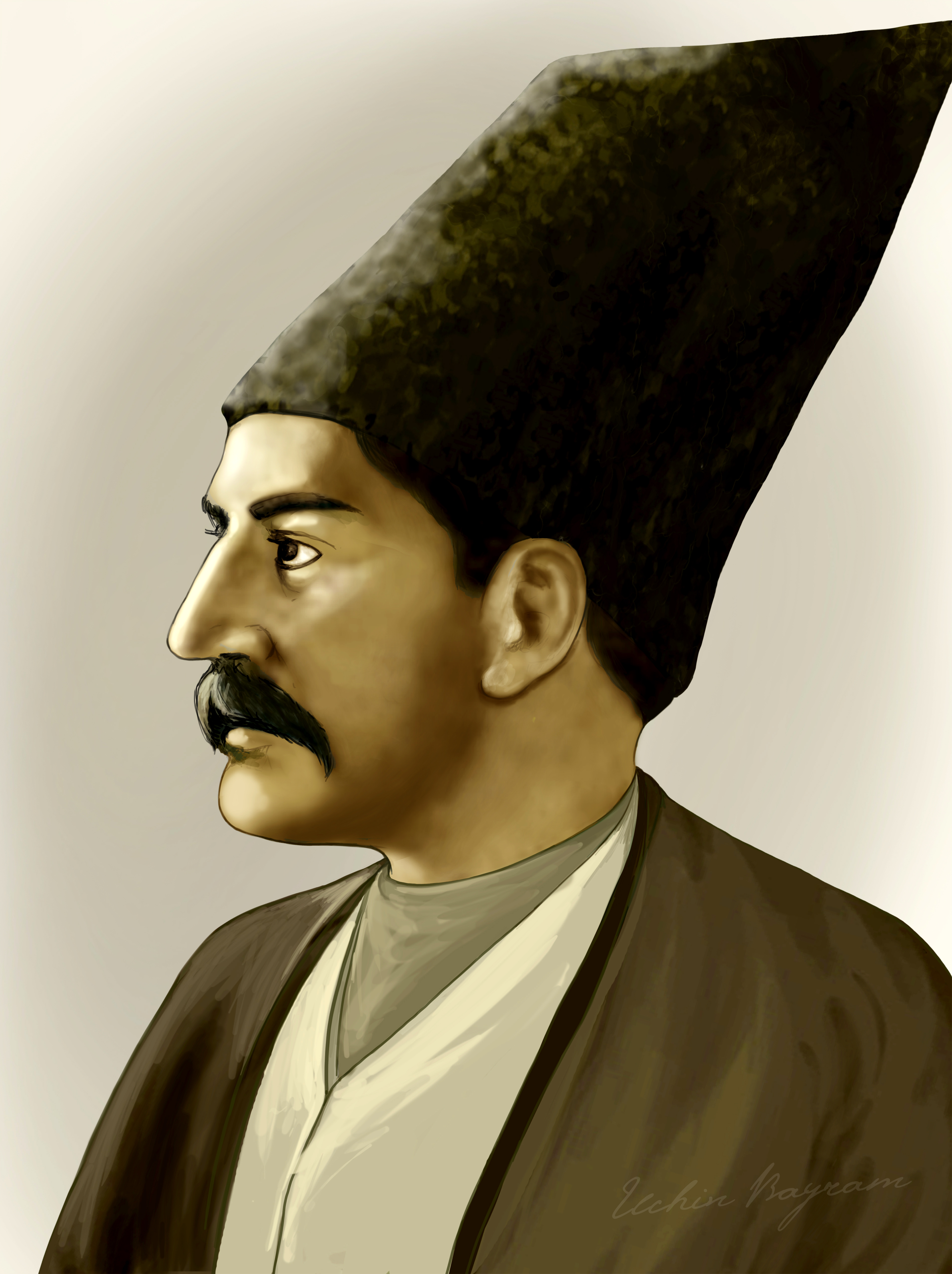 Mirzə Şəfi Vazeh (1794, Gəncə – 1852, Tbilisi) — XIX əsr Azərbaycan şairi.